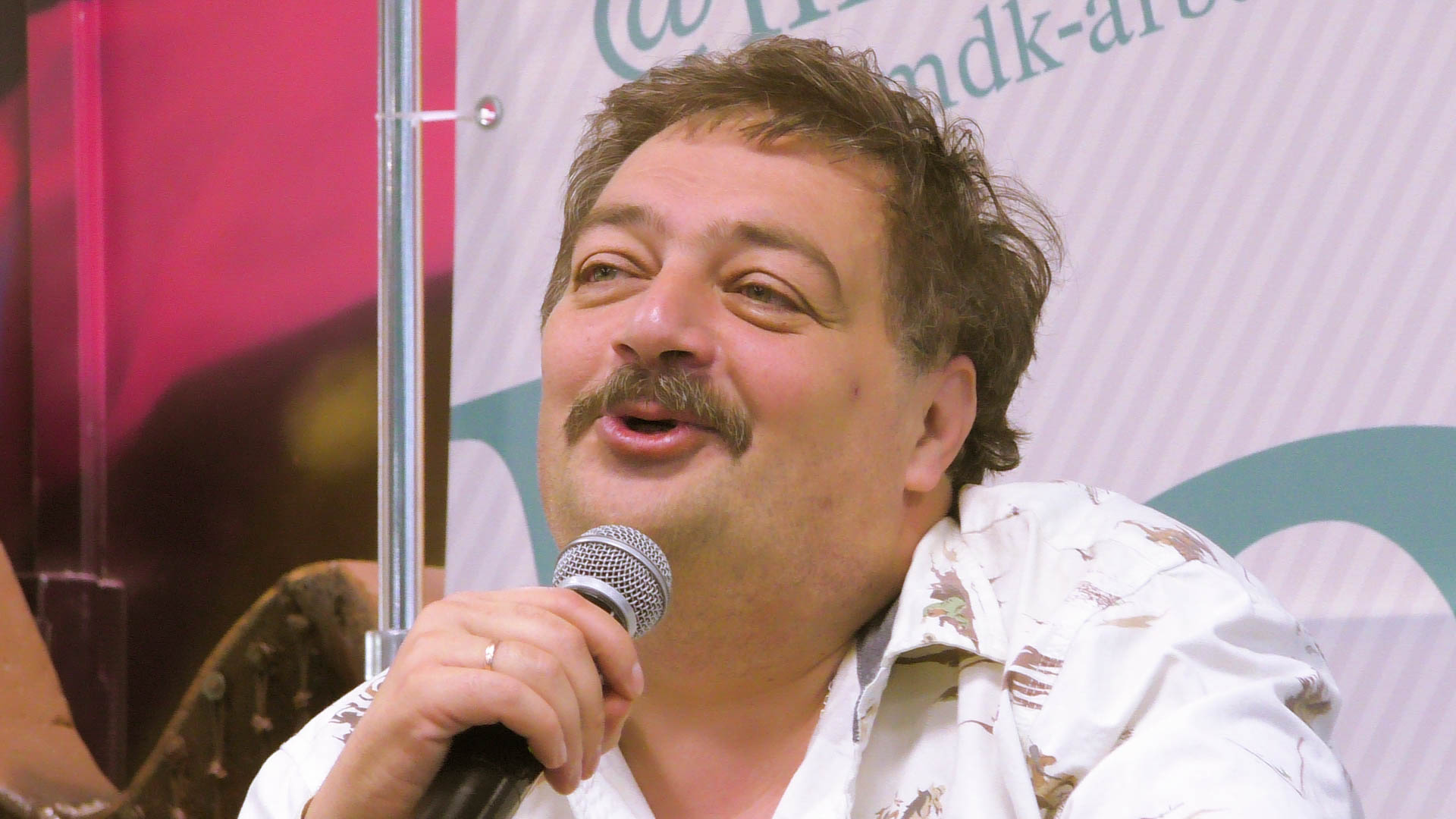 Дмитрий Быков в Московском Доме Книги 20.05.2017.